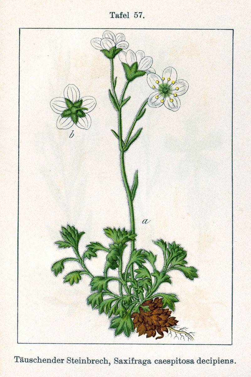 Saxifraga rosacea subsp. rosacea, syn. Saxifraga cespitosa subsp. decipiens Bonnier & Layens Original Description Täuschender Steinbrech, Saxifraga caespitosa decipiens